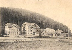 Hotel Bären in Titisee-Neustadt, Ausschnitt aus einer Ansichtskarte